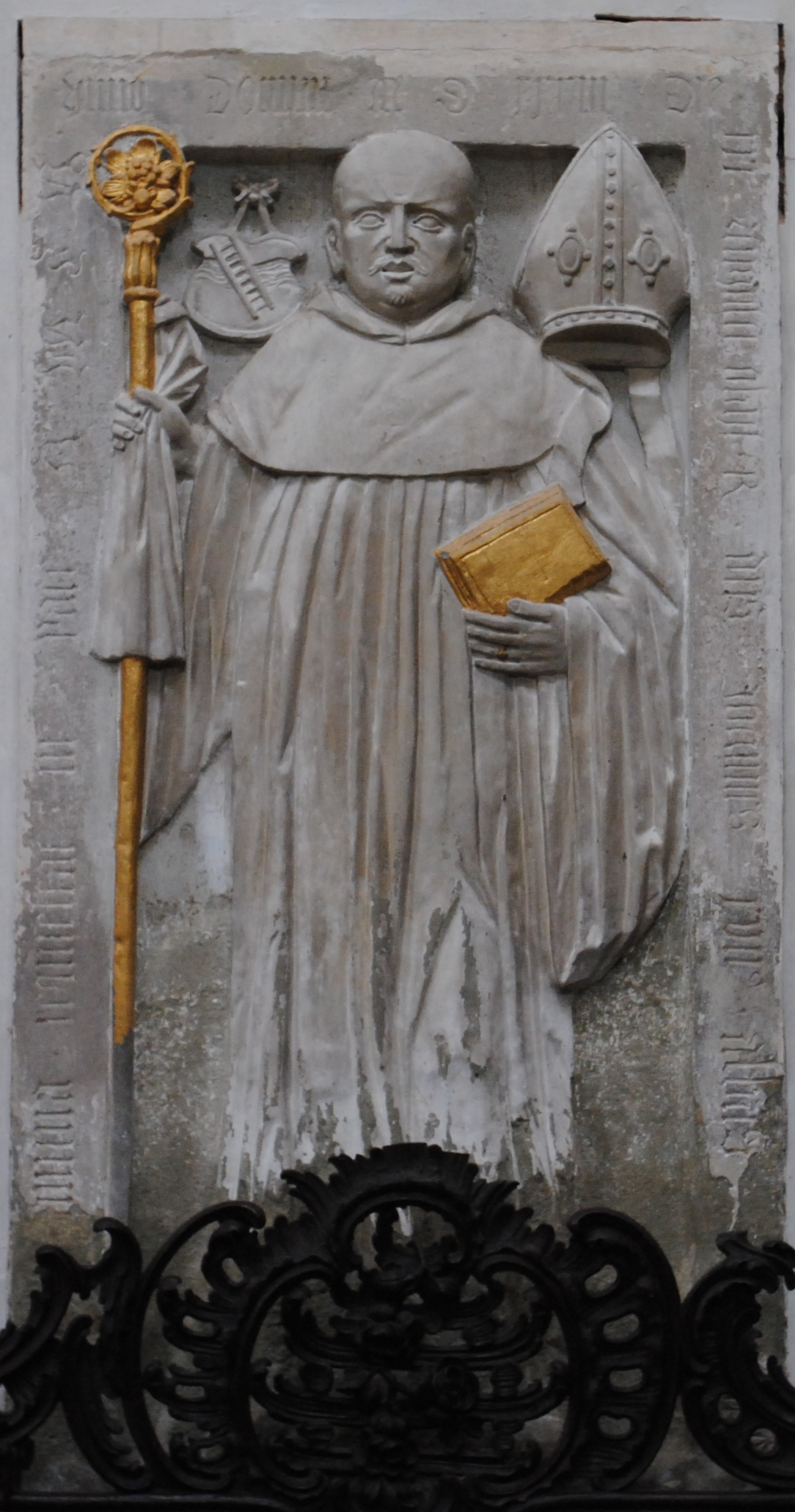 Epitaph des Abtes Johann II. Leiterbach, Abt von Kloster Ebrach, Amtszeit 1503-1531